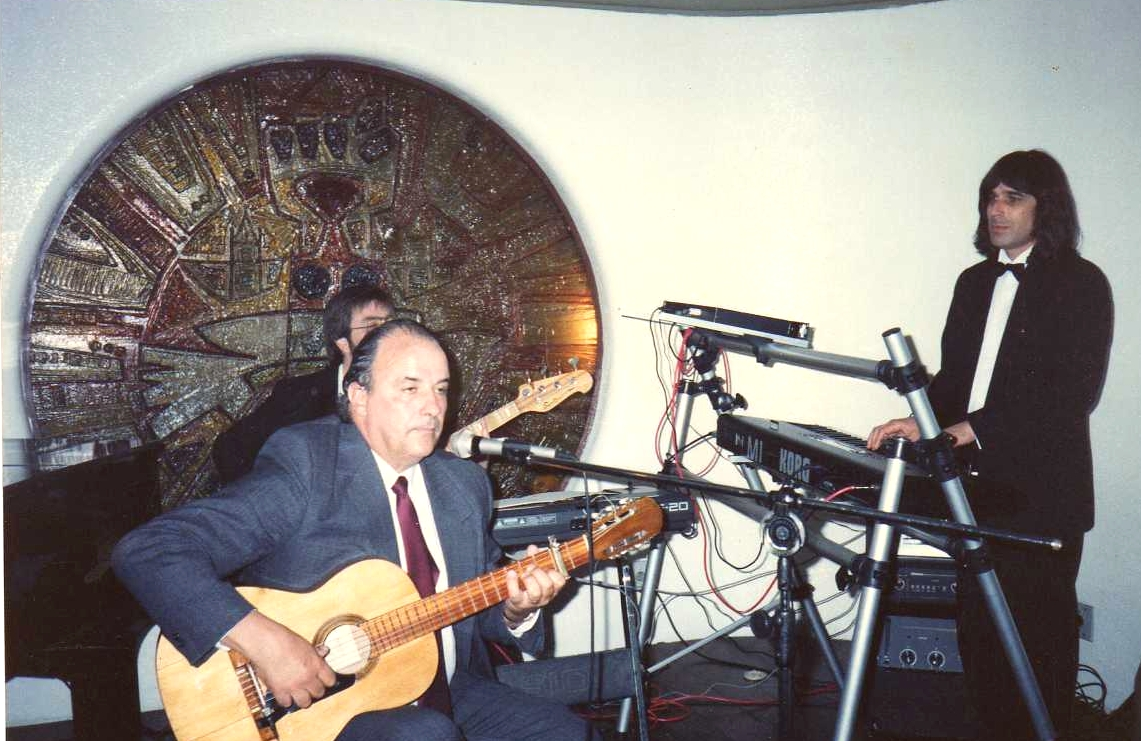 Santiago Chalar, cantante, compositor de Uruguay